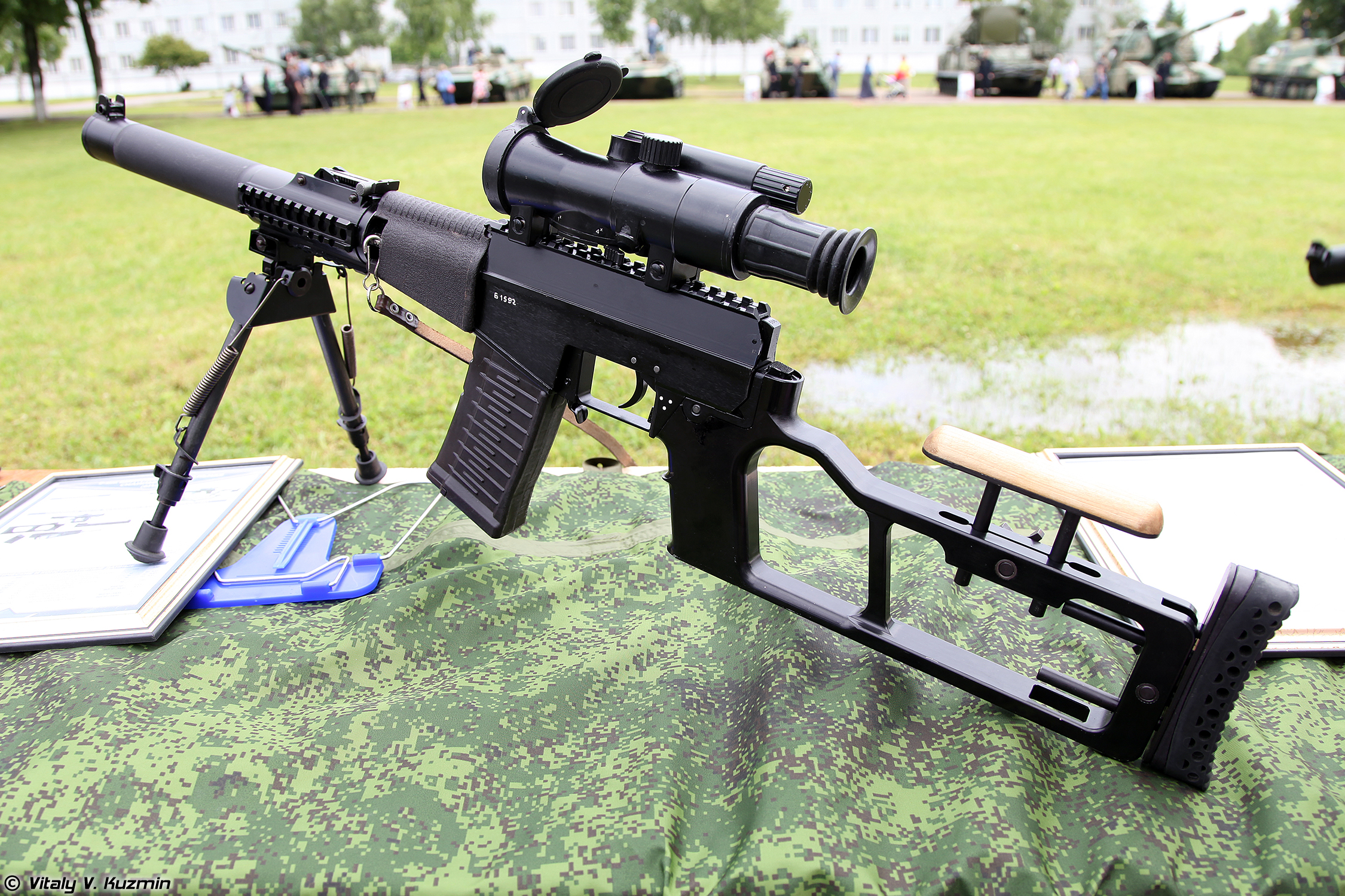 Винтовка снайперская специальная модернизированная ВССМ Винторез 6П29М (Modernized sniper rifle VSSM Vintorez 6P29M)